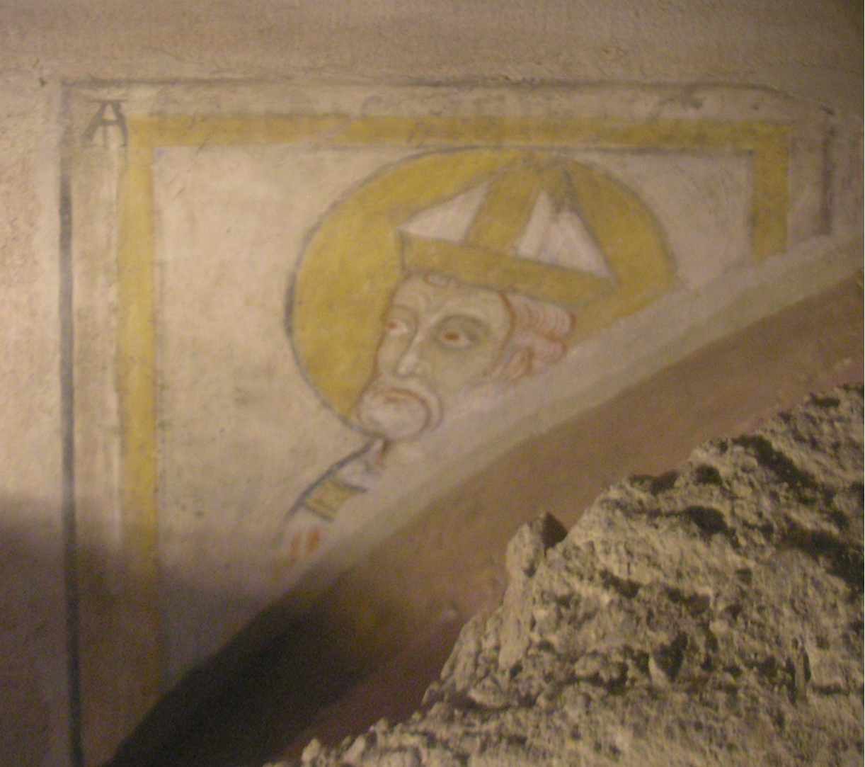 Bischof Adalberto II. 999-1025.